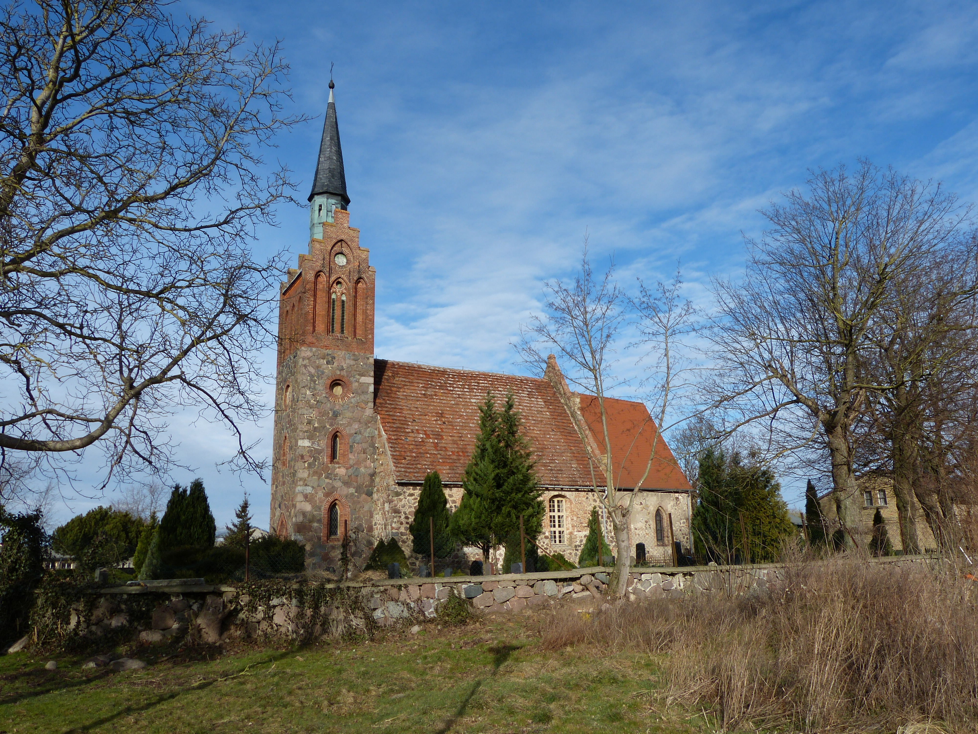 Kirche Völschow, Südseite und Friedhofsmauer